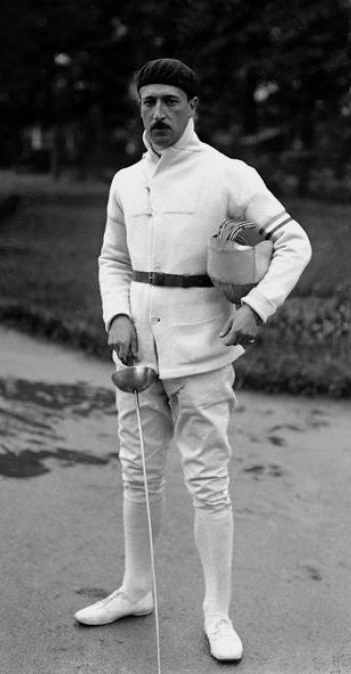 Alexandre Lippmann